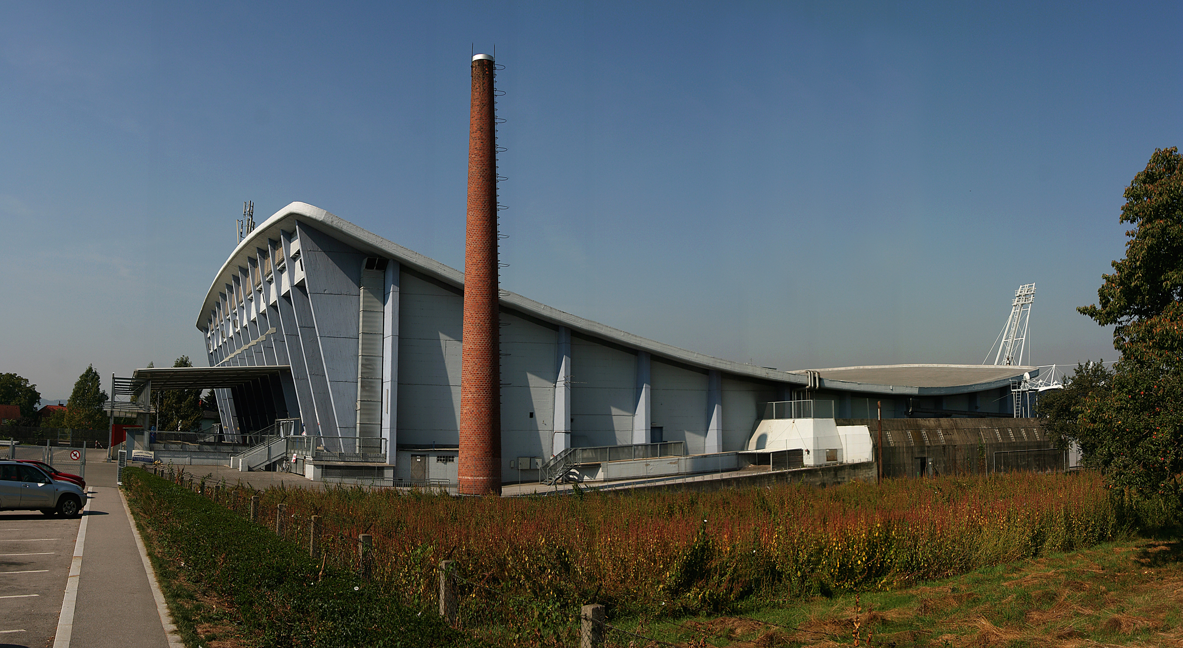 Eisstadion Graz-Liebenau, Außenansicht